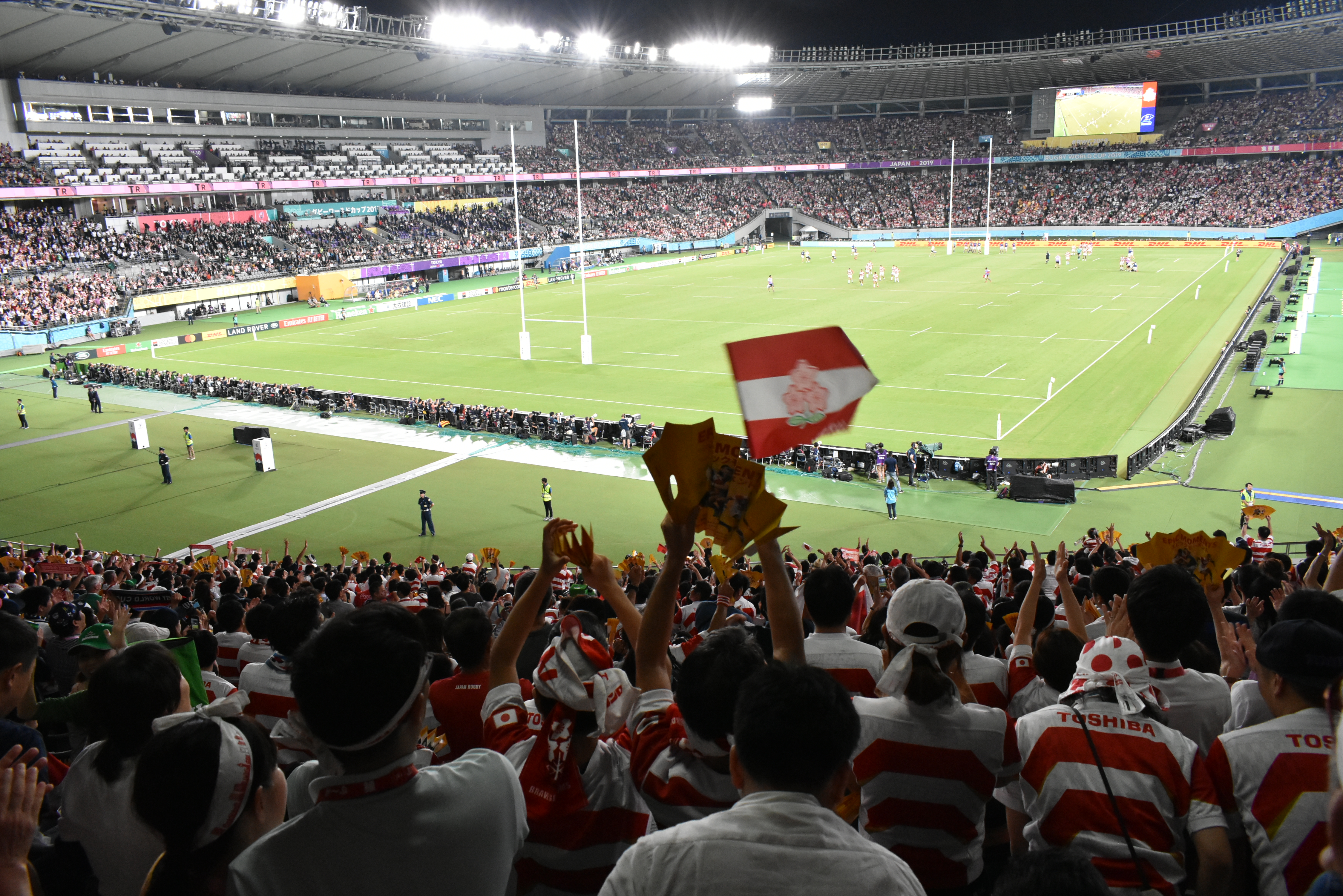 ラグビーワールドカップ2019